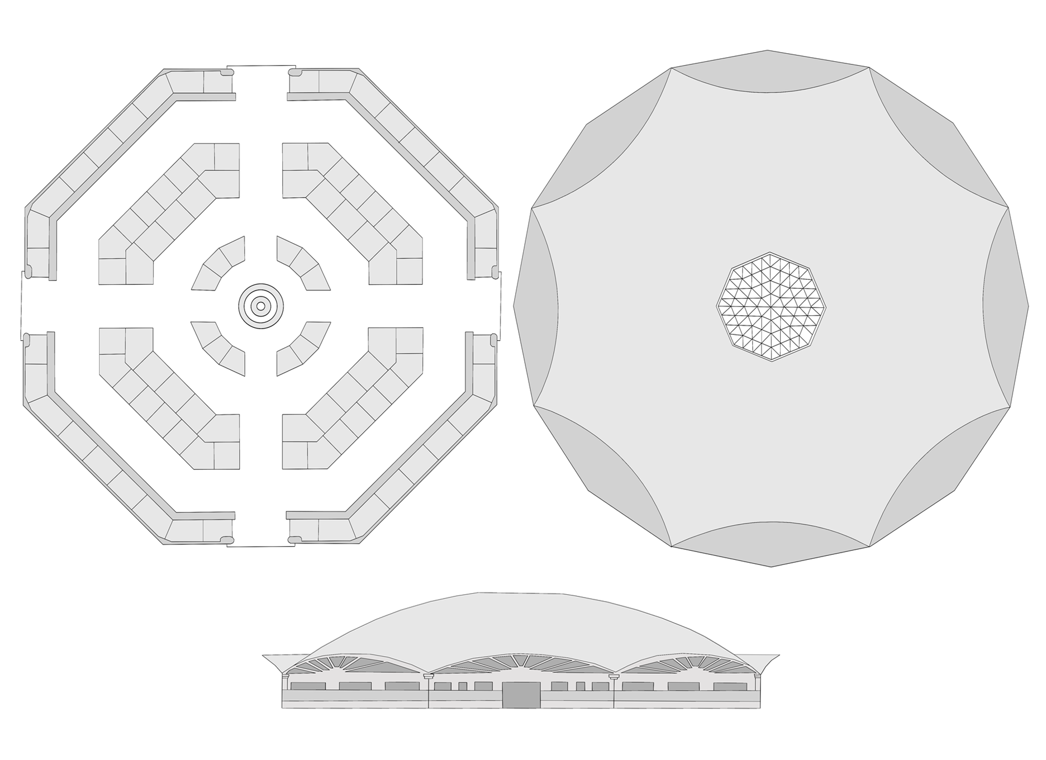 Plano del Mercado de Abastos de Algeciras, obra de Eduardo Torroja Miret construida en 1935. Se observa en la image de la izquierda la planta de su interior con los puestos en cuatro anillos concéntricos, el primero adosado al muro exterior y los otros dos adosados entre ellos, y el puesto central. En la imagen de la derecha se observa la cúpula de 47,80 metros de diámetro, 44,10 metros de radio de curvatura, 9 cm de espesor en su zona central y 50 en la zona de unión a los pilares, perforada por una claraboya de 10 metros de diámetro. Debajo el alzado de tres de sus caras con una de sus puertas. Algeciras, Andalucía, España.